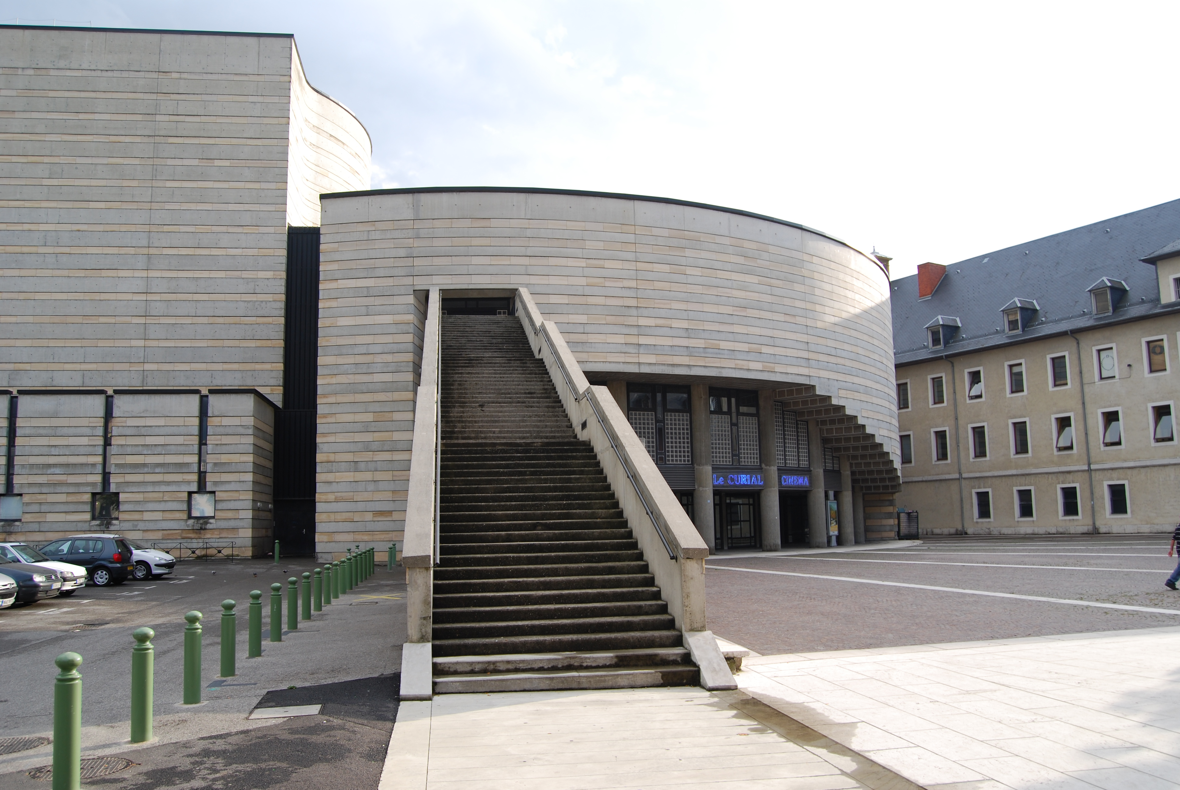 Espace culturel André Malraux, architecte Mario Botta (1985-1987). Lancée par le maire Francis Ampe, le bâtiment est construit sous Pierre Dumas ; Chambéry se dote d'un espace culturel plus grand que le Théâtre Charles Dullin. Le nouveau bâtiment (scène nationale, 945 places) est accolé à la Médiathèque Jean-Jacques Rousseau, dans le cadre du réaménagement du quartier des casernes. L'escalier monumental permet la sortie des spectateurs de la salle. Le cinéma est dessous.